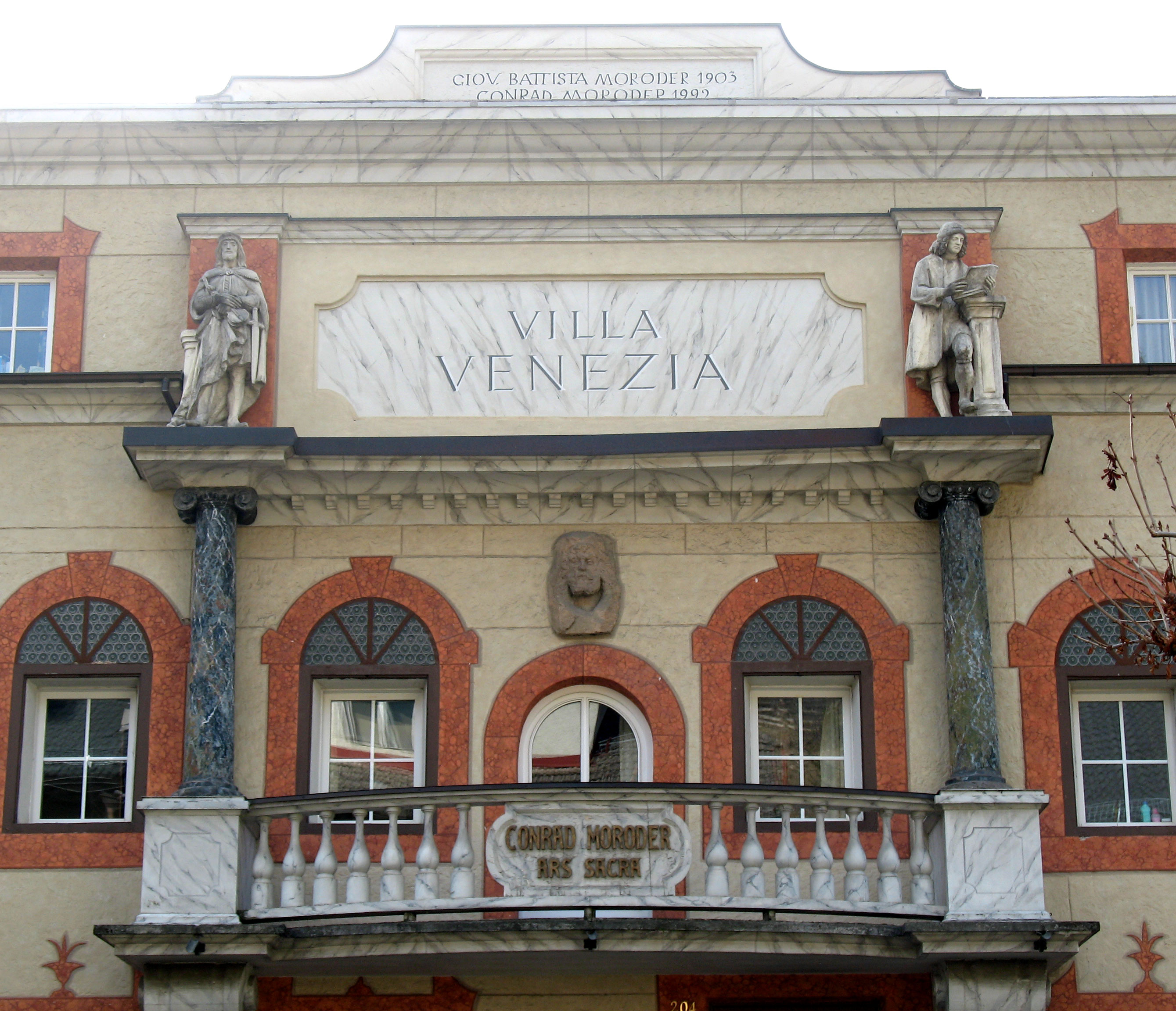 Detail of Villa Venezia in wood by Johann Baptist Moroder-Lusenberg (1870 – 1932) in St. Ulrich in Gröden - Ortisei Val Gardena